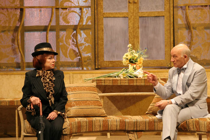 Сцена из спектакля Саратовского академического театра драмы «Квартет» по пьесе Рональда Харвуда. Актёры Людмила Гришина Александр Галко